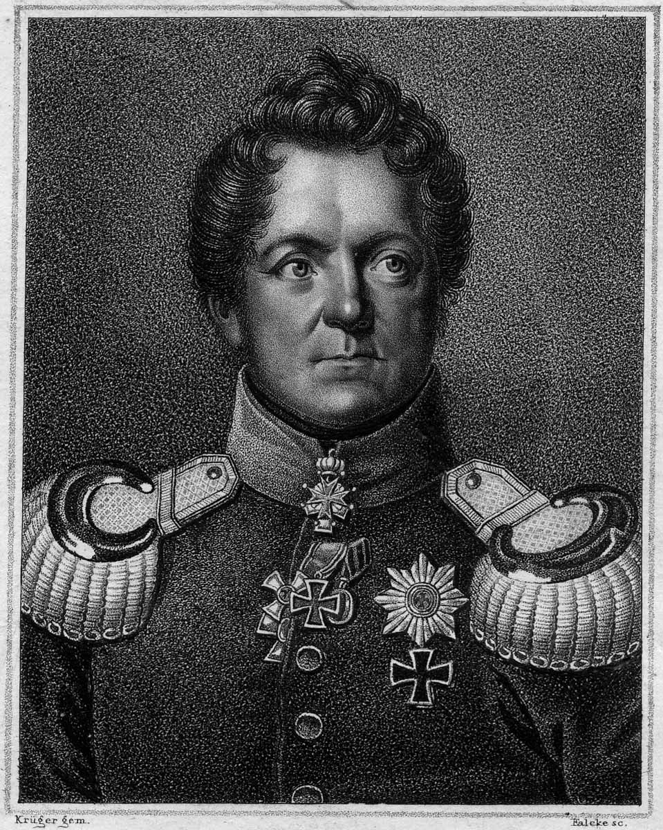 engraving of August von Gneisenau (1760-1831). Prussian Field Marshal. Original caption: Krüger gem. | Falcke sc. Nach dem Leben gezeichnet GNEISENAU KÖNIGL: PR: GENERAL FELDMARSCHALL Druck u. Verlag vom Bibliographischen Institut zu Hildburghausen | Zeitgenossen № 59 (III Jahrg:)